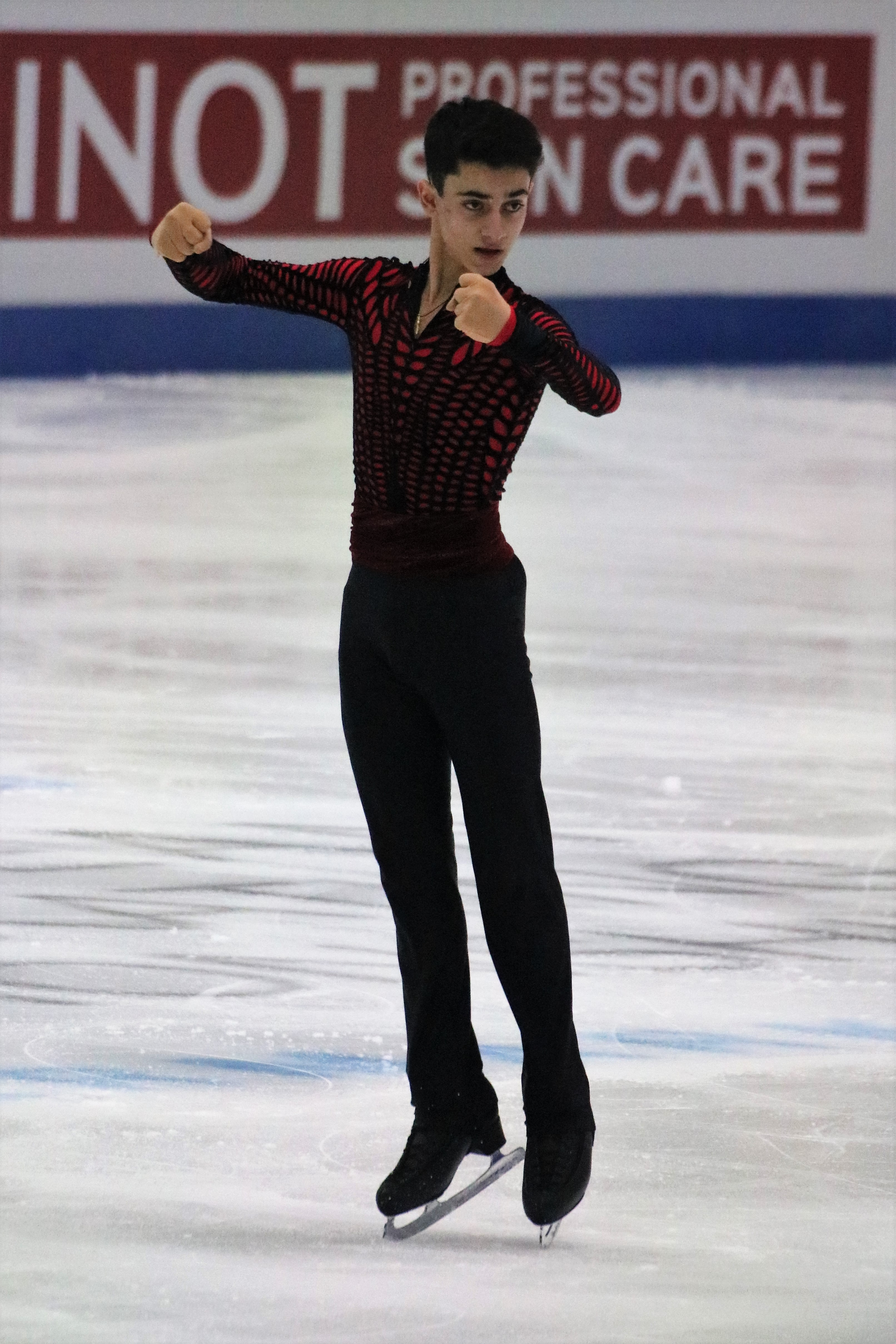 Артур Даниелян (Россия) на чемпионате Европы по фигурному катанию 2020